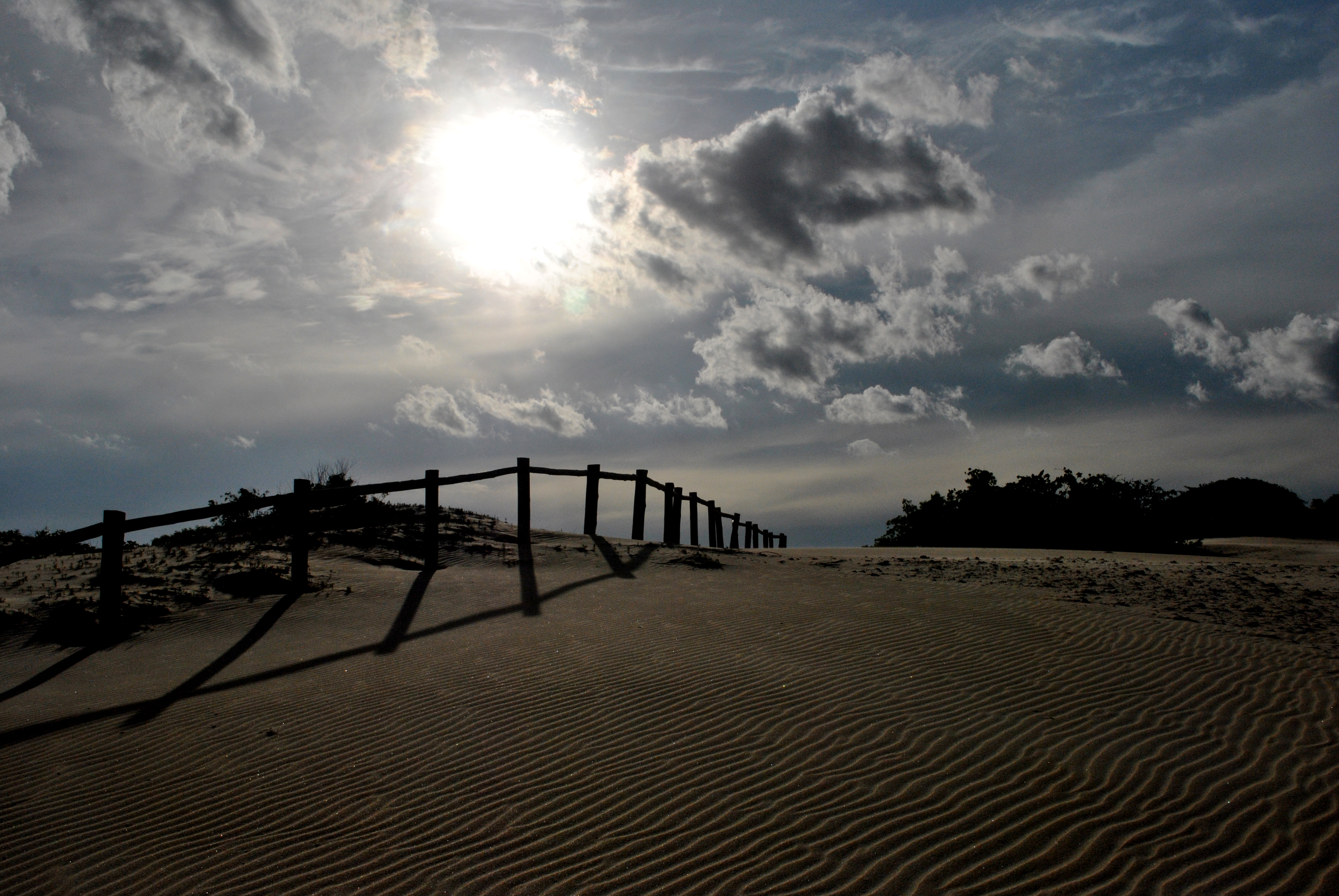 Dunas de Itaunas-ES, Brasil. Localidade onde a cidade foi soterrada pela areia.